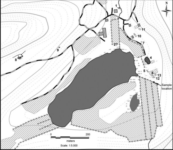 Plan du site archéologique ferme Ø 69, vestiges nordiques à Vatnahverfi.